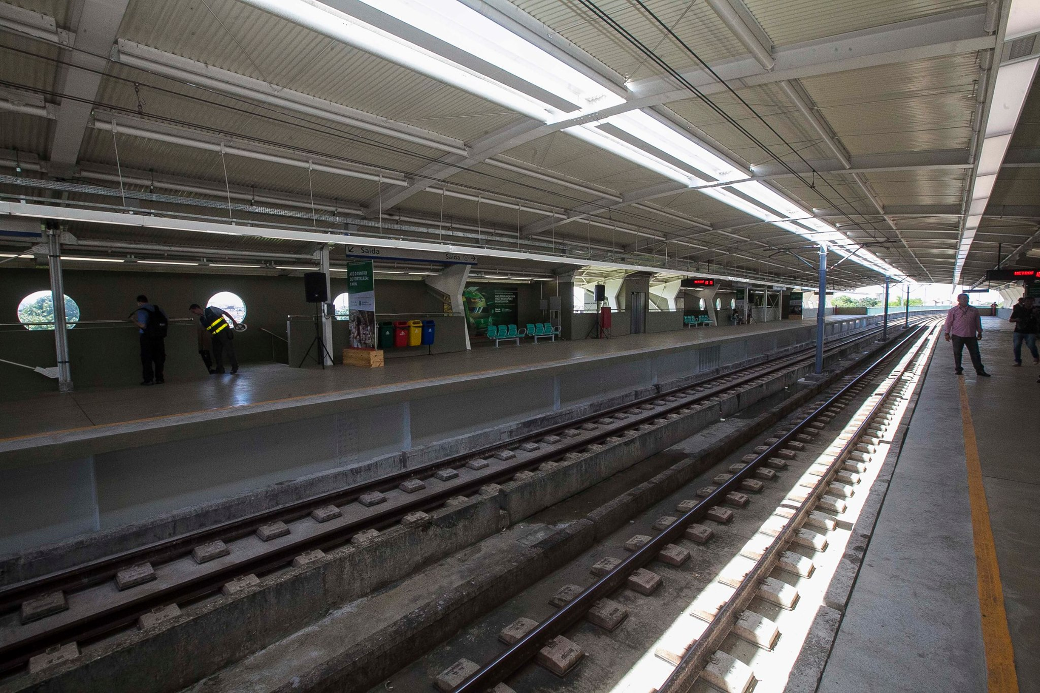 Plataforma da Estação Juscelino Kubitschek durante a inauguração